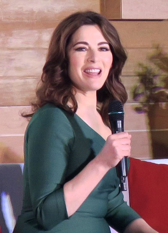 Nigella Lawson in Manila